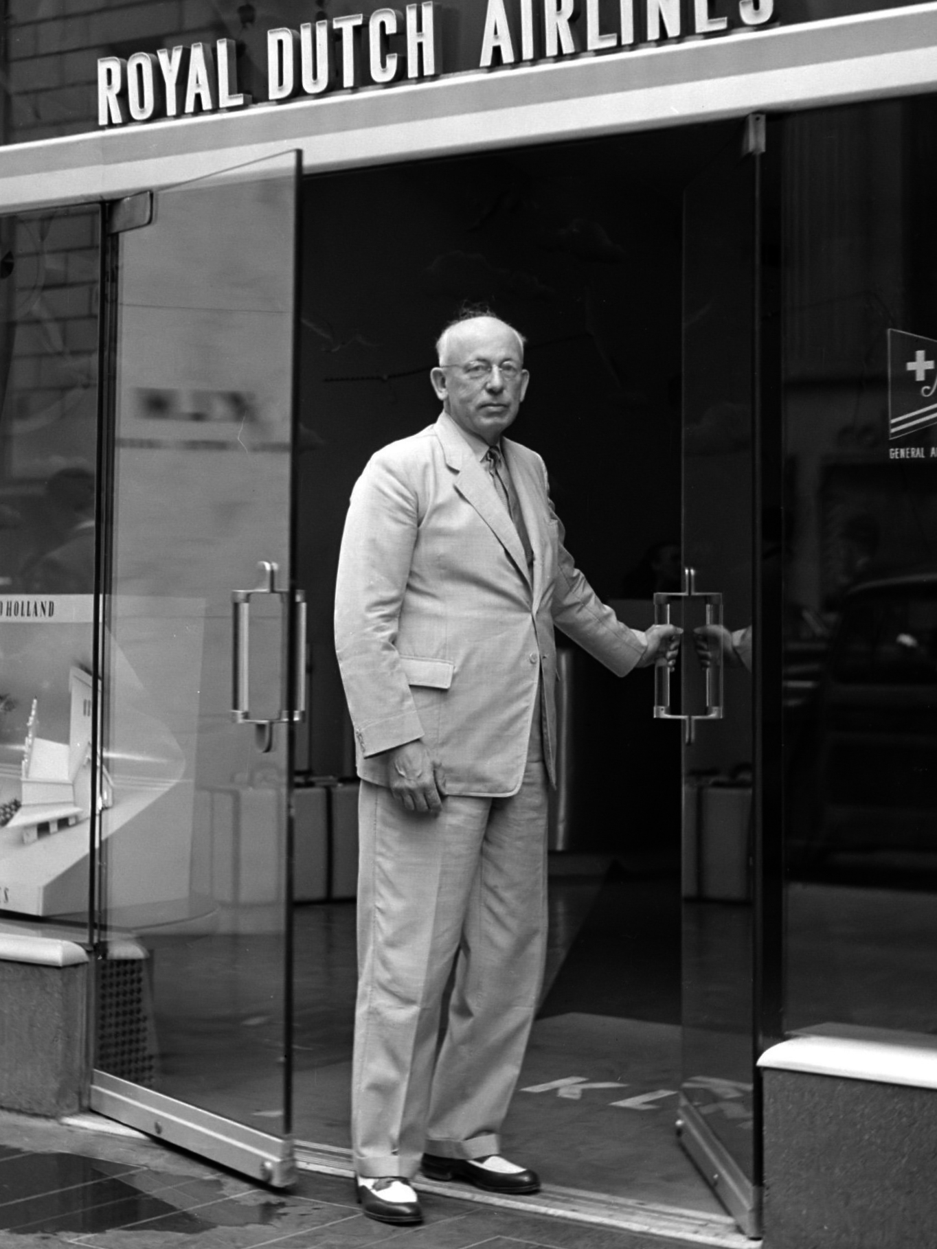 Hans Martin voor de deur van het kantoor van de KLM in New York 1946